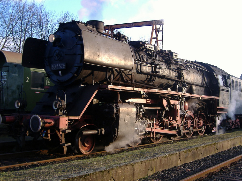 Dampflok 50 3576 der Nassauischen Touristikbahn